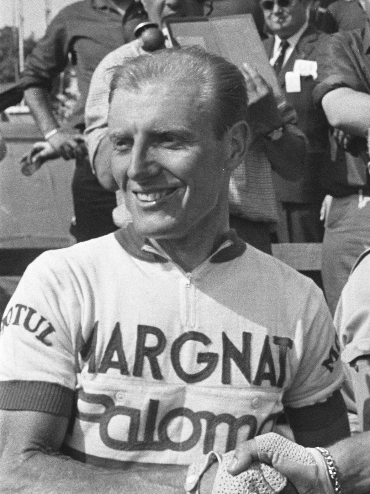 51ste Tour de France 1964. Finish Amiens.Dagwinnaar Darrigade met Sels (gele truidrager).